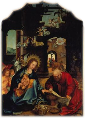 O retábulo "do Paraíso", assim designado uma vez que provém do altar-mor do extinto Convento do Paraíso em Lisboa, foi já objecto de alguns estudos que resultaram em opiniões diversas e divergentes no que toca à sua autoria. Num primeiro momento, o conjunto foi atribuído a Grão Vasco (Vasco Fernandes), por Taborda e Cirilo, opinião refutada por Raczynski que propôs o nome de Abram Prim (Primus). Carl Justi apontou como autor o pintor Velascus e Émile Bartaux dividiu a série em dois conjuntos, atribuindo a "Anunciação", a "Visitação" e a "Natividade" a Cristóvão de Figueiredo, e os restantes painéis ao "Mestre do Retábulo de Santiago". Foi, porém, José de Figueiredo quem reagropou novamente as oito pinturas e as enquadrou na obra do "Mestre do Paraíso", no que foi secundado por Reinaldo dos Santos. A Myron Malkiel-Jirmounsky, coube alertar para o facto de estarmos na presença de uma obra colectiva e não de um só pintor. Actualmente, e na esteira deste último historiador, ainda que se destaque o nome de Gregório Lopes na atribuição deste conjunto retabular, não há dúvida em se afirmar que se trata de uma obra de parceria, o que é desde logo visível na heterogeneidade pictórica e técnica das várias tábuas que o compõem.